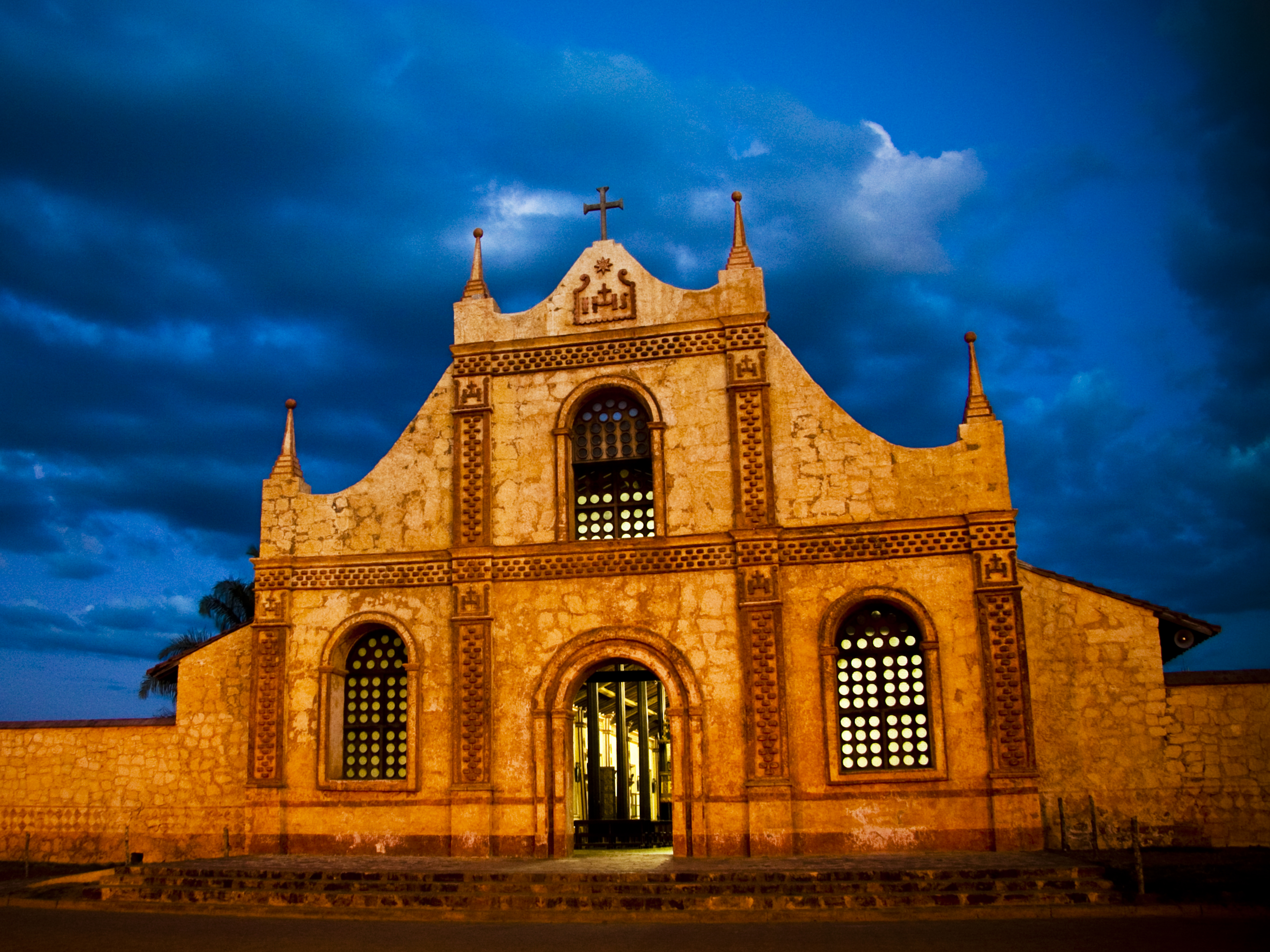 Templo de San José This medium shows the protected monument with the number S/00-042 in Bolivia.